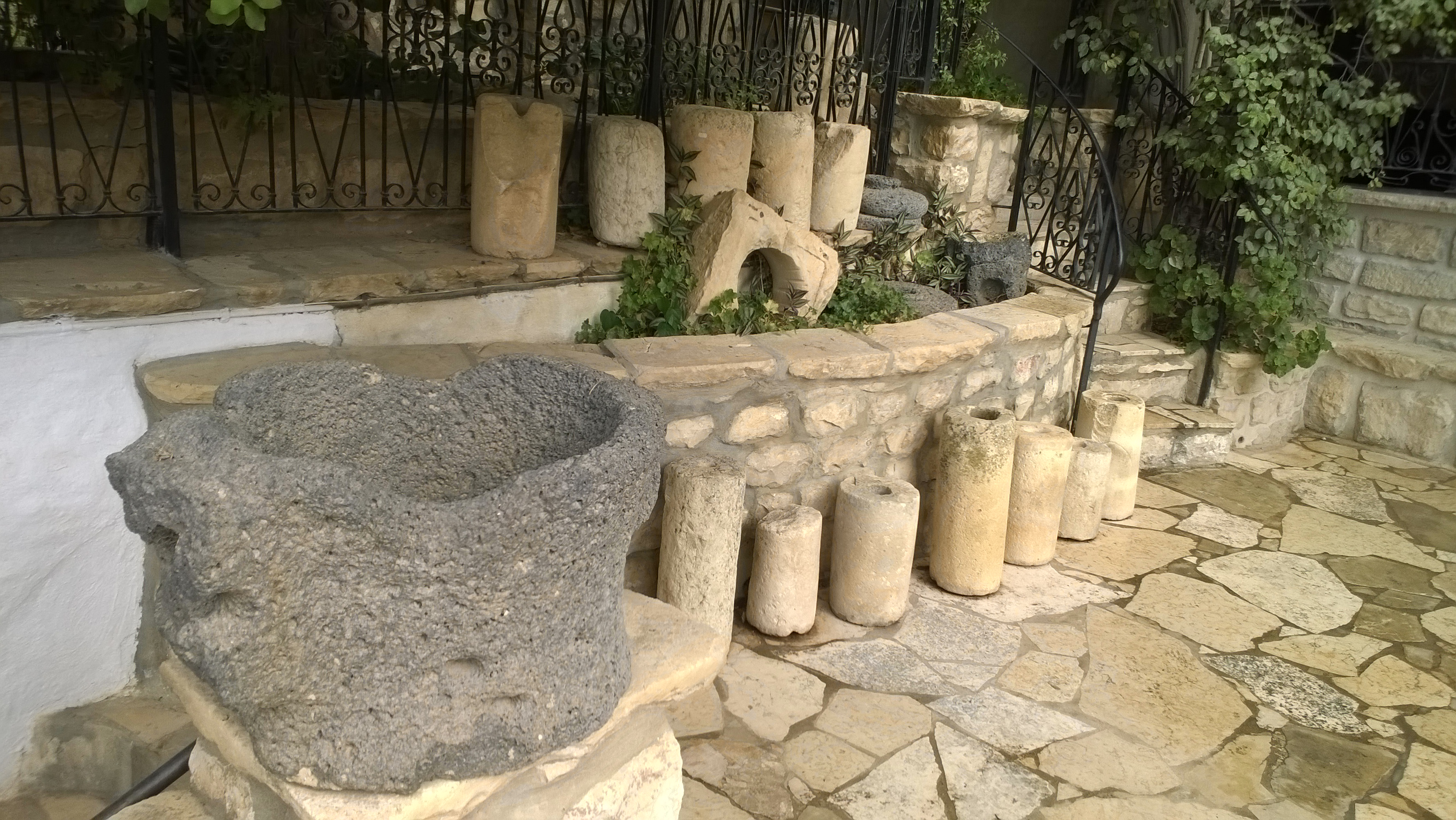 מוזיאון בית המאירי הוא מוזיאון היסטורי המתעד את קורות היישוב היהודי בצפת מן המאה ה-19 ועד שנת 1948.